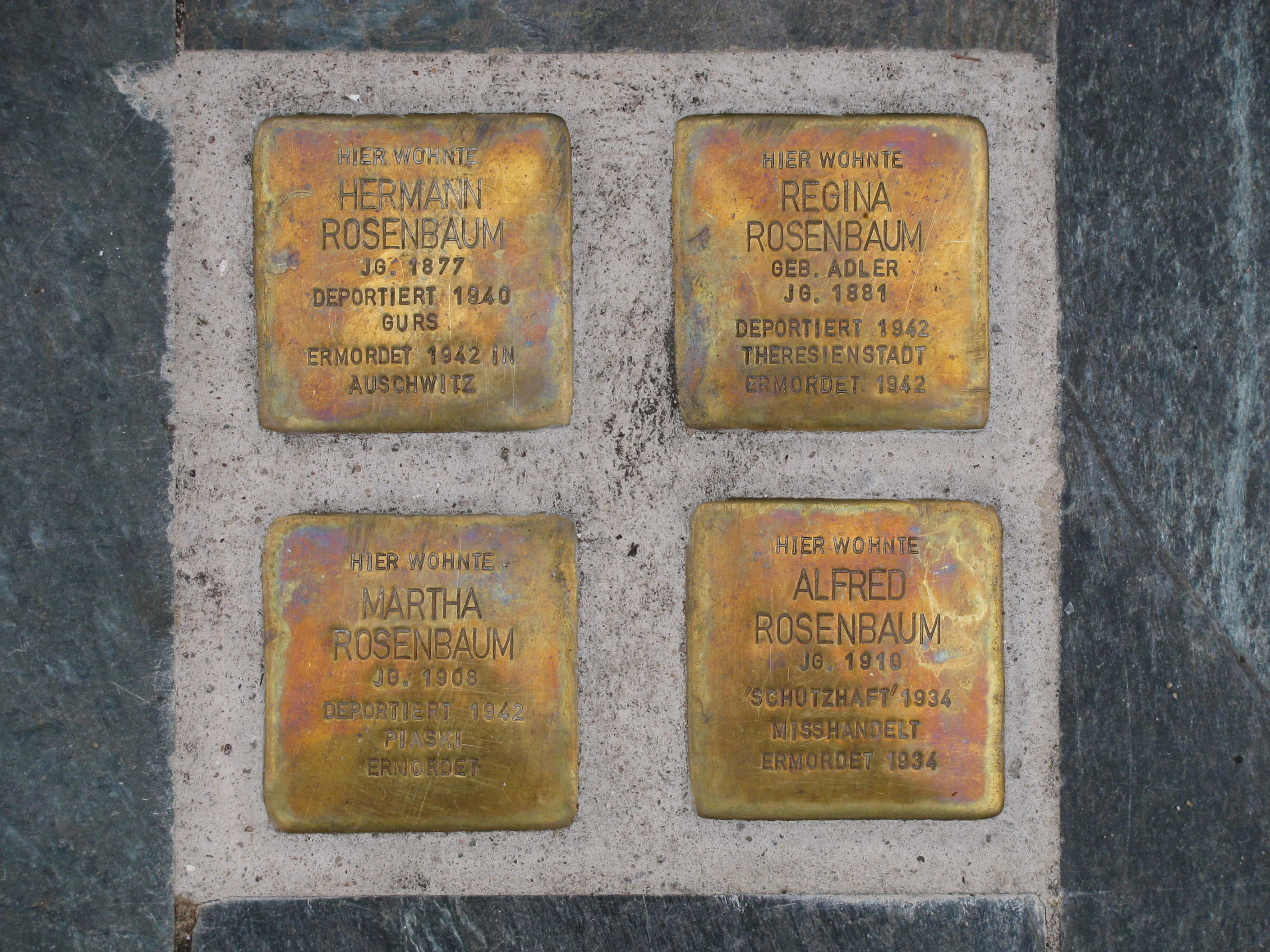 Deutschland - Baden-Württemberg - Main-Tauber-Kreis - Wertheim: Stolpersteine